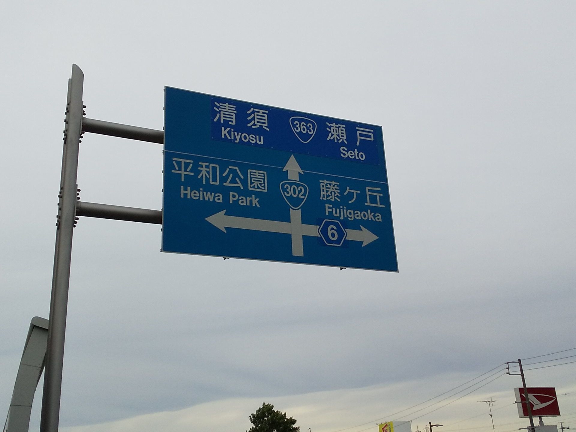 愛知県道6号の終点。分岐する道路は後で愛知県道に編入されたのがわかる。